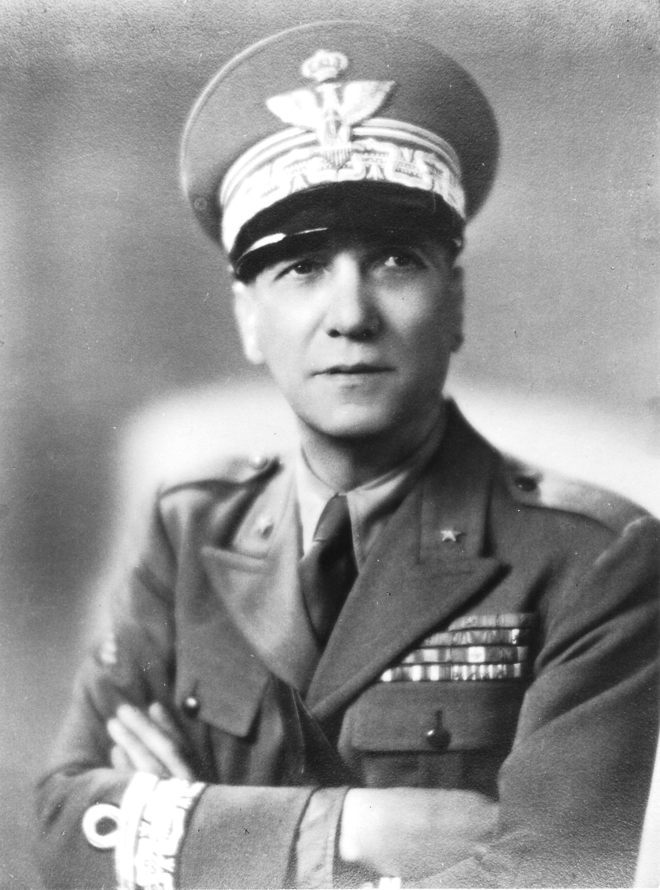 Generale di Divisione Bruno Malaguti